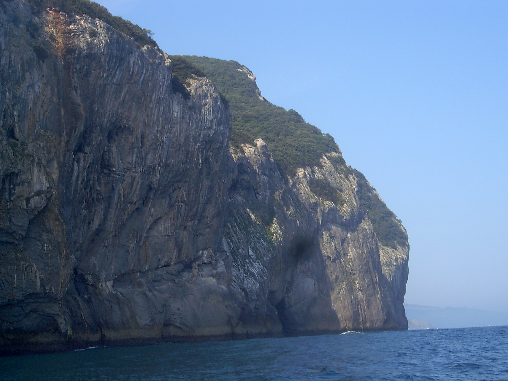 Ogoño cape